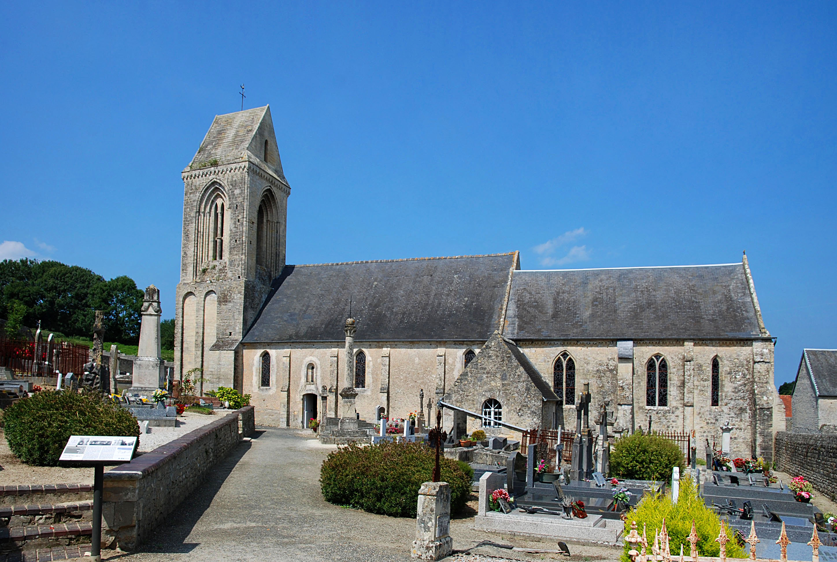 Sainte-Honorine-des-Pertes (Calvados)